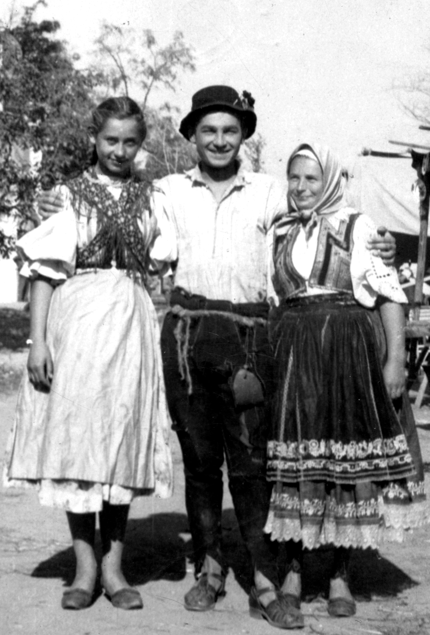 Soós Imre Soós Imre (Balmazújváros, 1930. február 12. – Budapest, 1957. június 20.) Jászai Mari-díjas magyar színész helybeliekkel a Lúdas Matyi című film forgatásán.